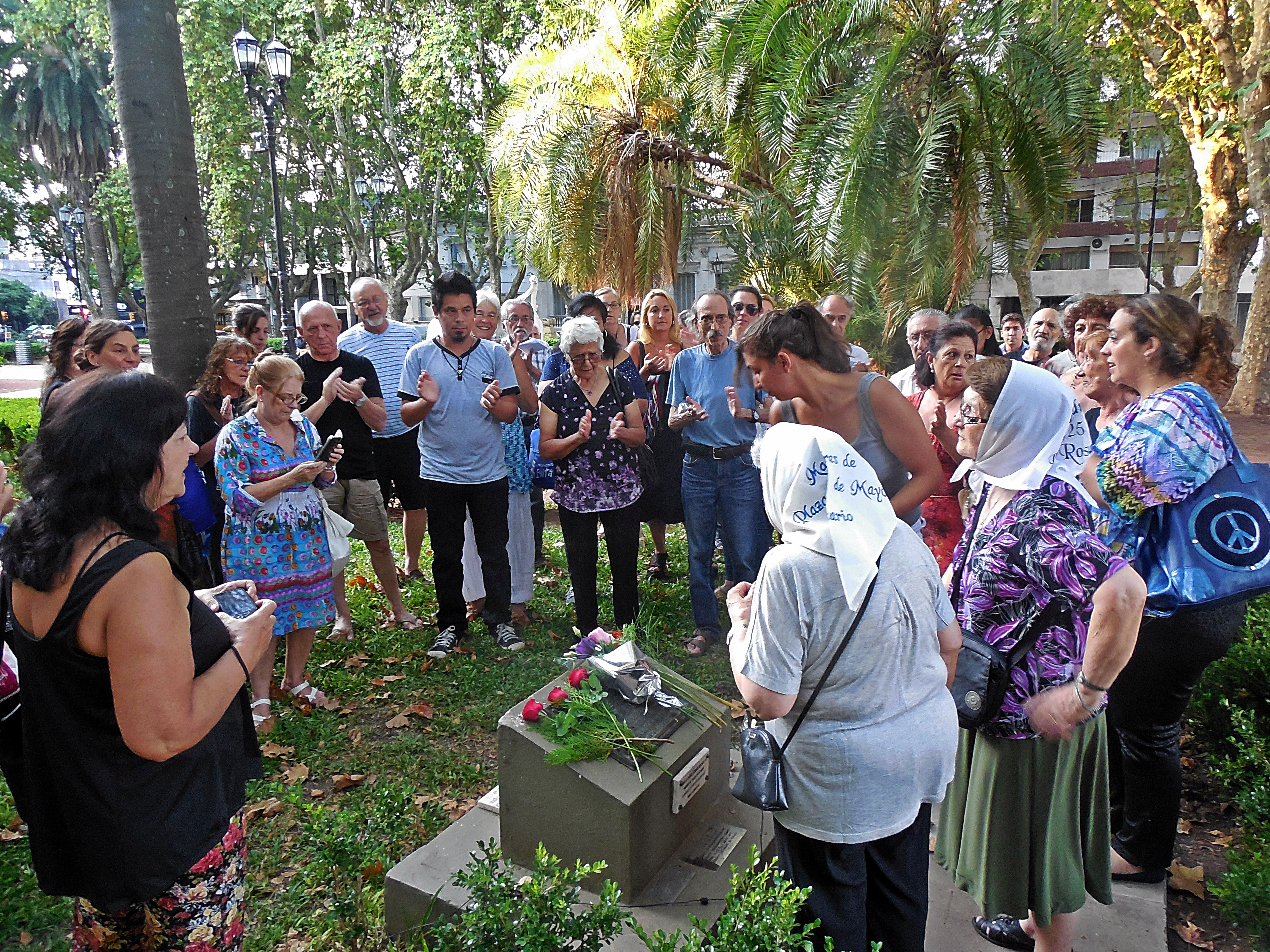 Chiche Massa y Norma Vermeulen despiden a Chocha, el 02 de febrero de 2017